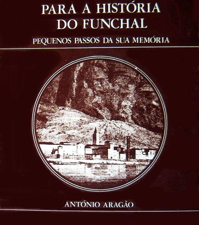 António Aragão, Para a História do Funchal, pequenos passos da sua memória, pesquisa e colaboração de Jorge Guerra, 1.ª 1979, DRAC, Funchal, ilha da Madeira. Existe 2.ª edição, de 1989.